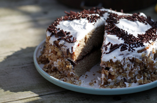 vegan vanilla-chocolate cream pie